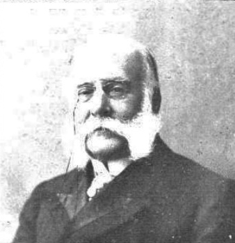 Alejandro Groizard.